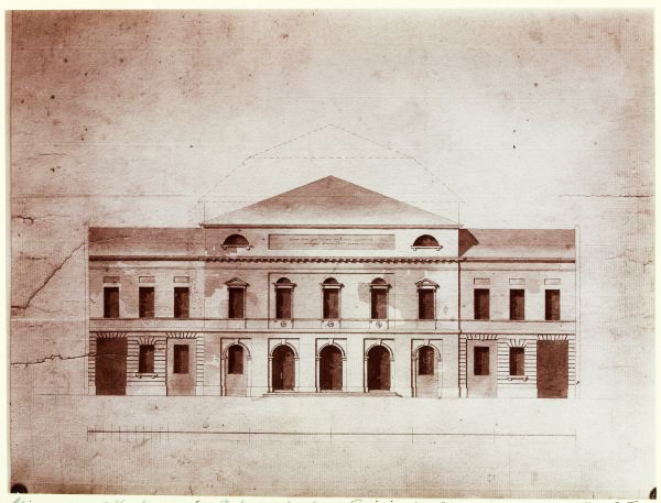 Mindre teatern or Segerlindska teatern. Södra Hamngatan 61, Göteborg